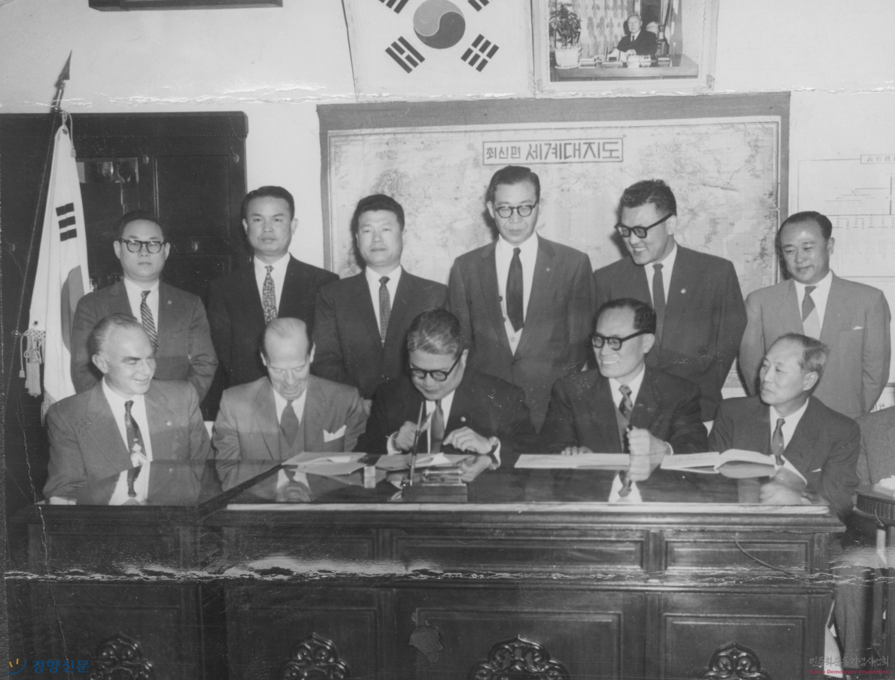 나주비료공장운영 역무대행계약을 체결하는 모습